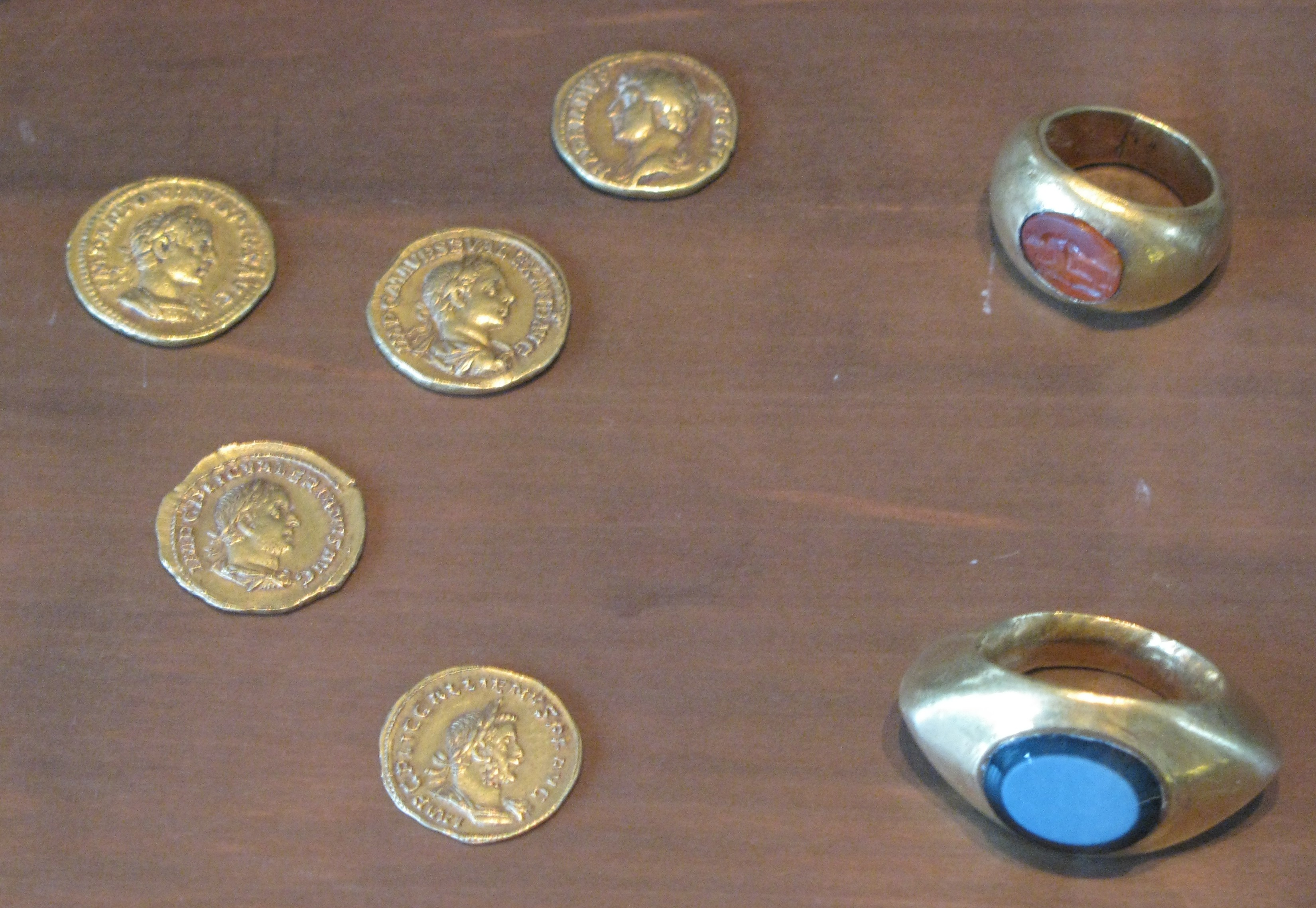 Trésor romain de Ruffieu, commune de Nivolas-Vermelle (Isère). Deux bagues et cinq aureus, d'Hadrien à Gallien (frappé en 262). Conservé au médailler du Musée des Beaux-arts de Lyon